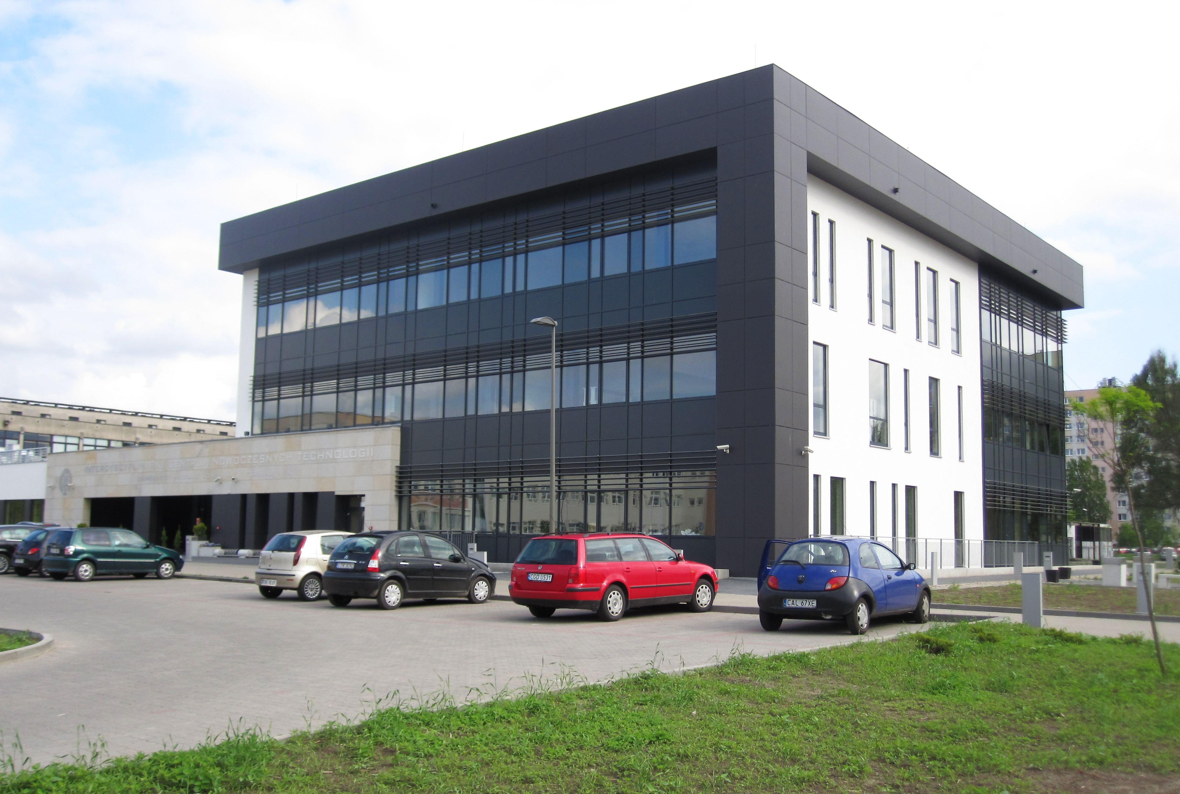 Interdyscyplinarne Centrum Nowoczesnych Technologii UMK w Toruniu